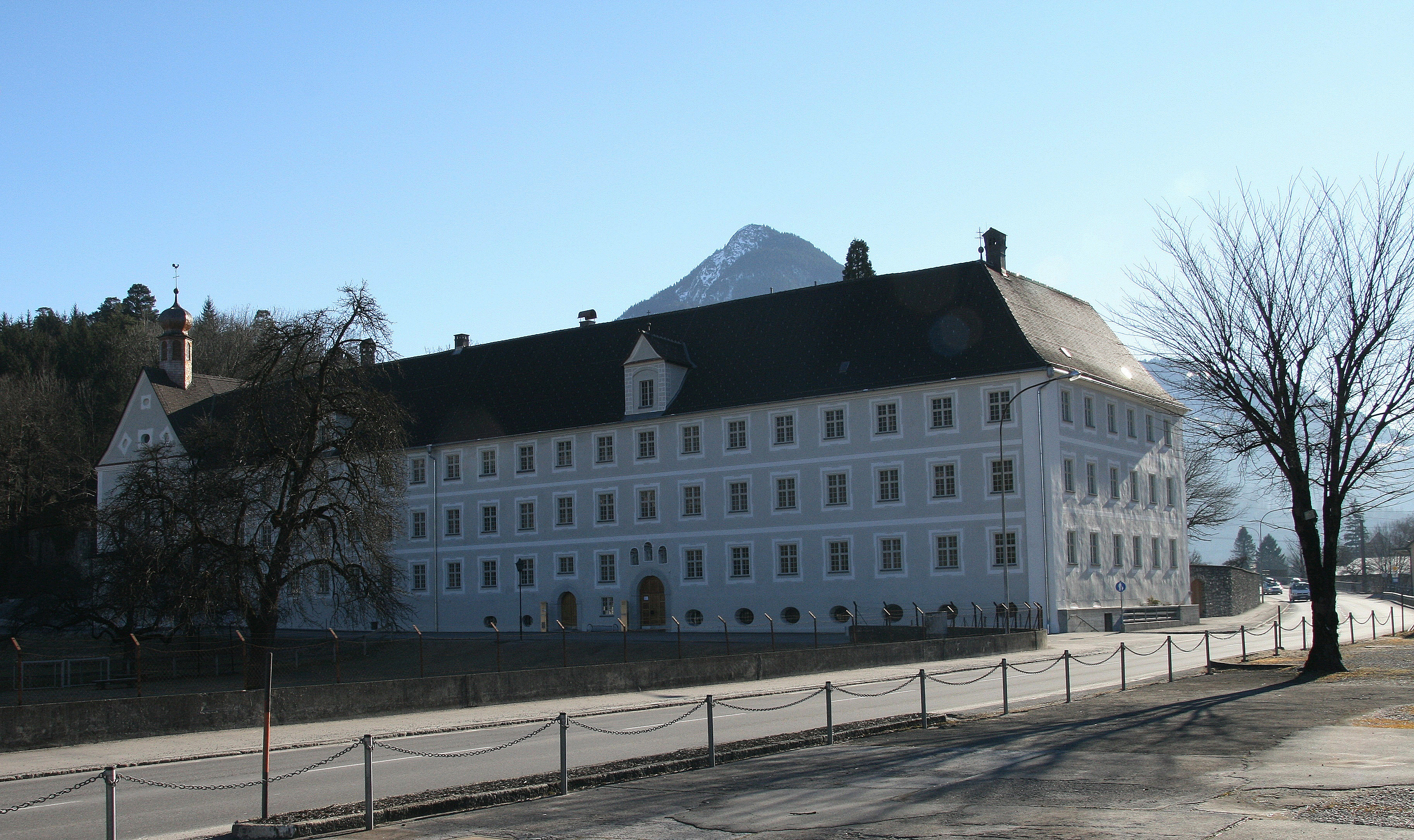 Dominikanerinnenkloster St. Peter in Bludenz, Vorarlberg